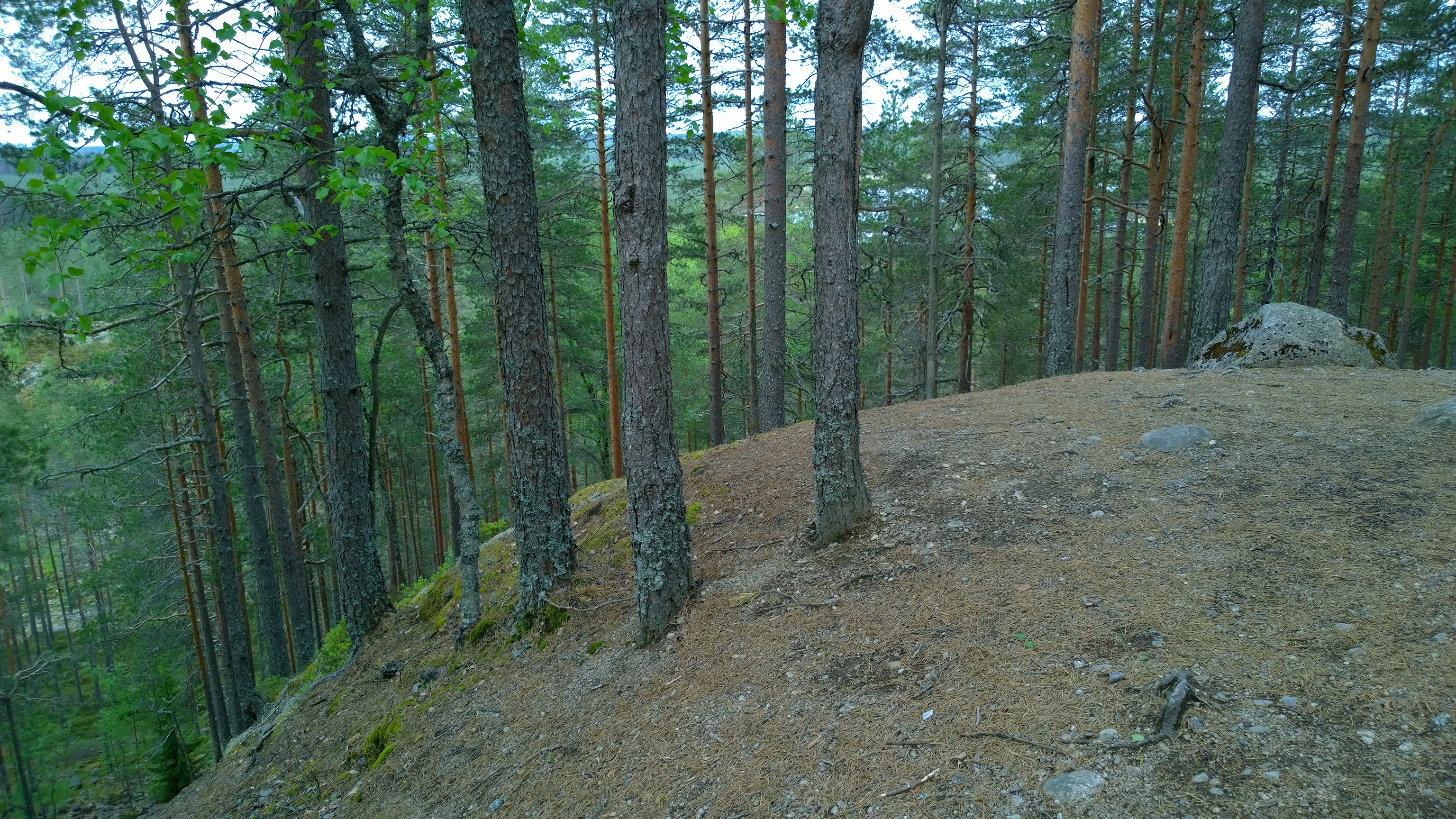 Saarijärven Kulhanvuori kohoaa ympäristöstään 60 metrin ja merenpinnasta 260 metrin korkeuteen.